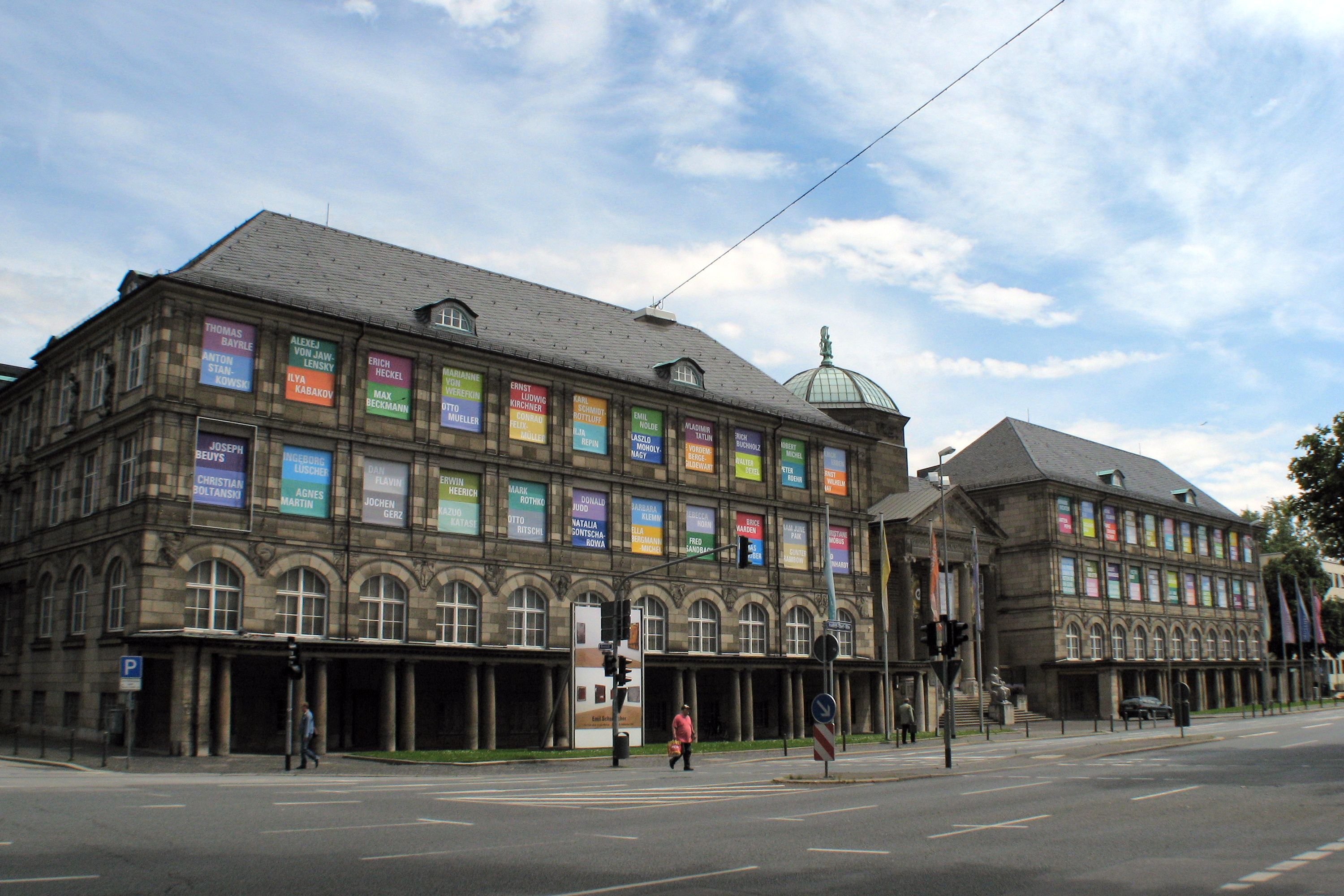 Museum Wiesbaden von der Rheinstraße aus gesehen